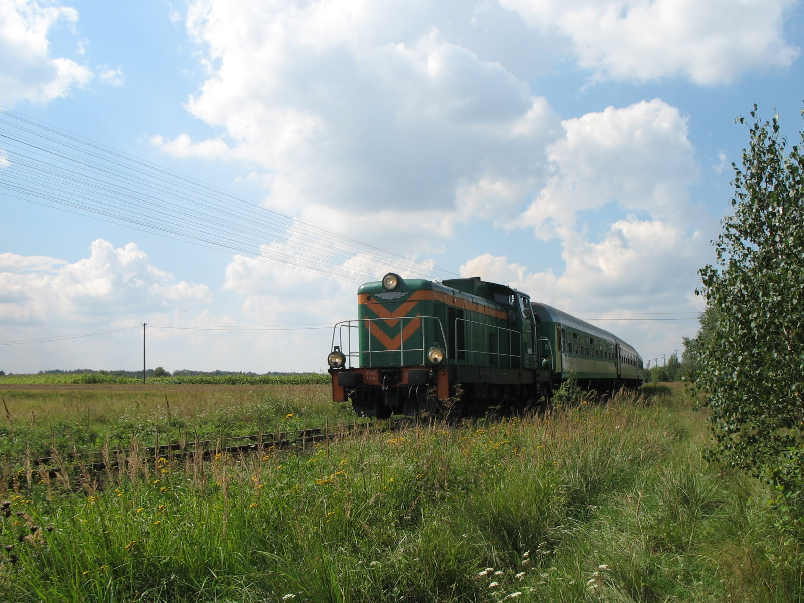 Basznia Dolna (Poland) train station